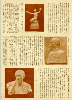 Magazine japonais présentant l’œuvre d’Eug. J. de Bremaecker